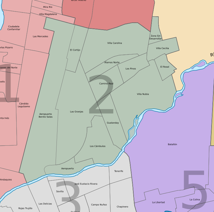 División barrial comuna 2, Neiva, departamento de Huila